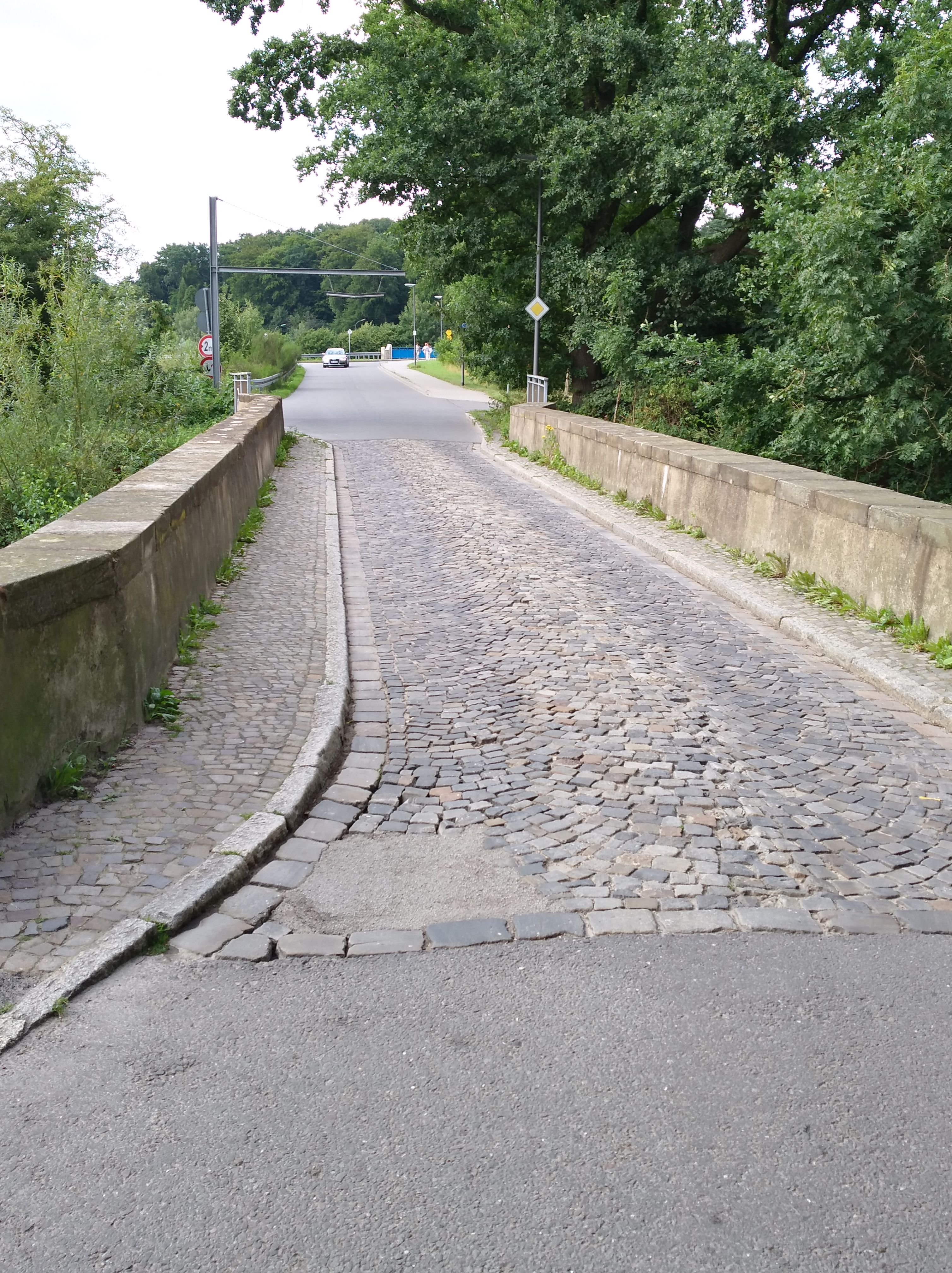 Die so genannte Römerbrücke als Teil der Straße "Die Eversburg" über einen Altarm der Hase in Osnabrück-Eversburg.